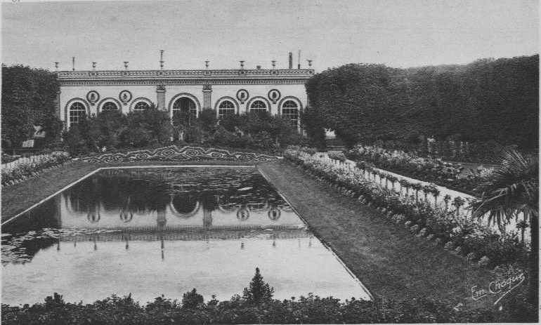 Vue du parc et château Moet & Chandon, carte postale début XXe siècle .